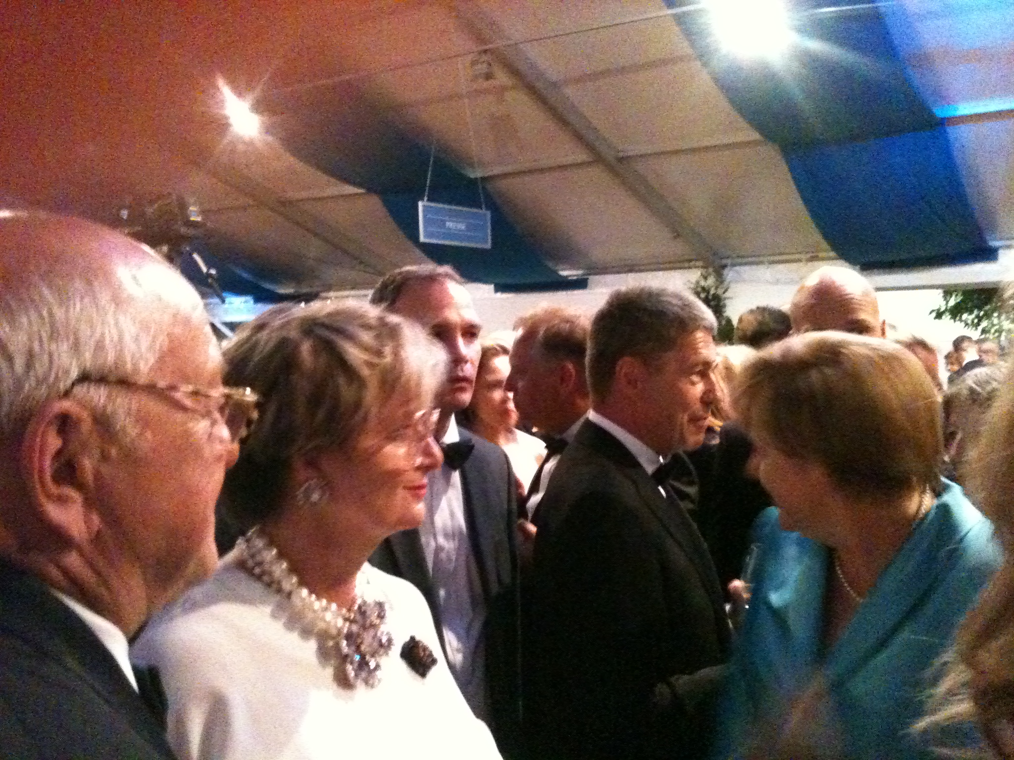 Wagner Festspiele Bayreuth 2015 - Kanzlerin Angela Merkel, Joachim Sauer, Gerwin Spalink und Fürstin Gloria von Thurn und Taxis